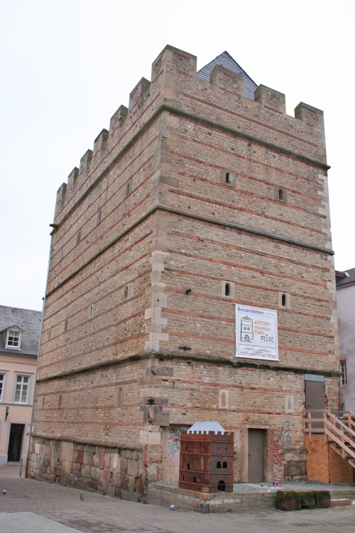 Frankentuerm zu Tréier.